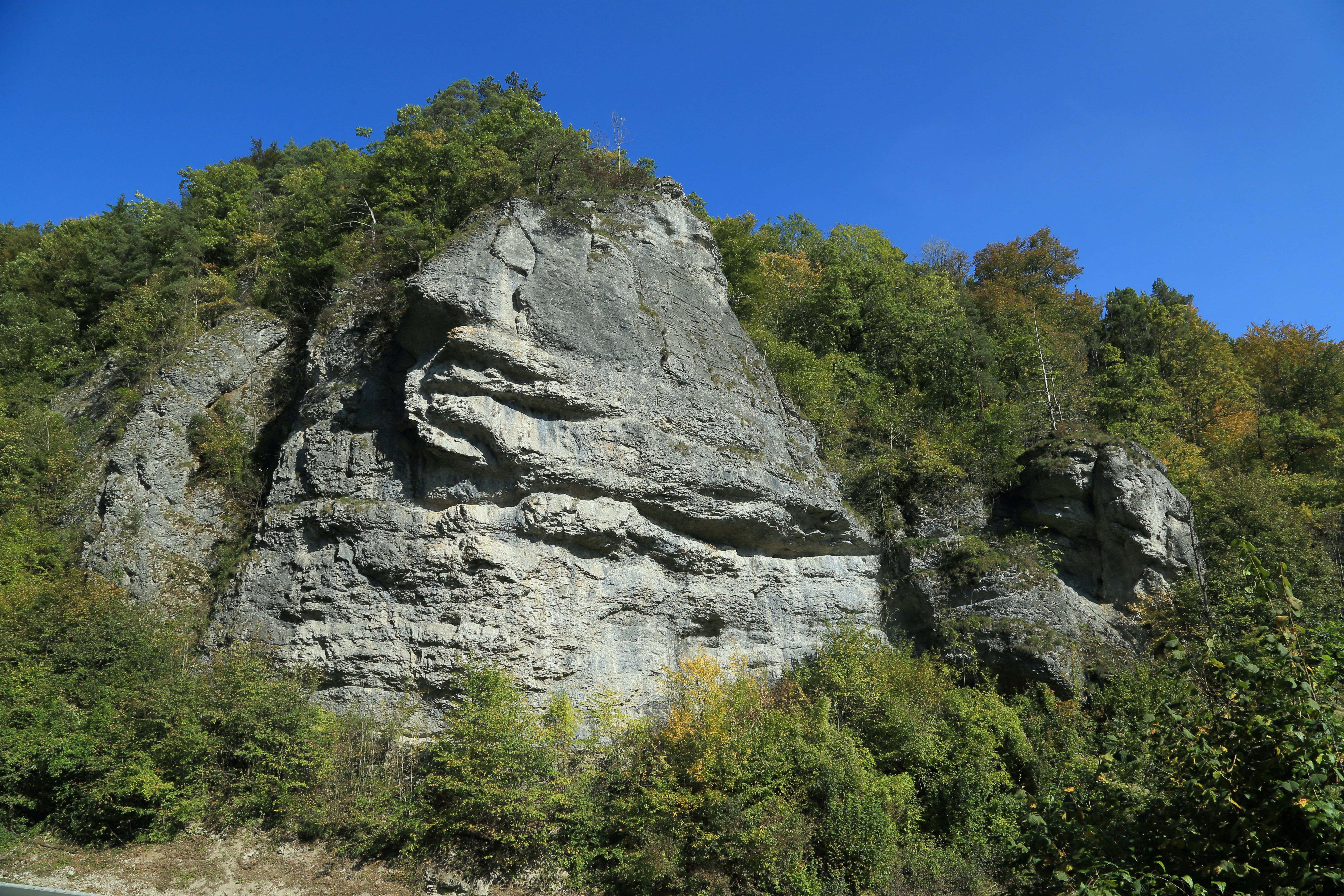 Schwammkalkfelsen "Markgrafenstein" N von Streitberg Geotop-Nummer: 474R021 6133GT000021 Wiesenttal Forchheim 6133 Muggendorf R: 4443795 H: 5520240 400 m ü.NN L: 100 m, B: 100 m, H: 18 m, F: 180 qm Nördliche Frankenalb